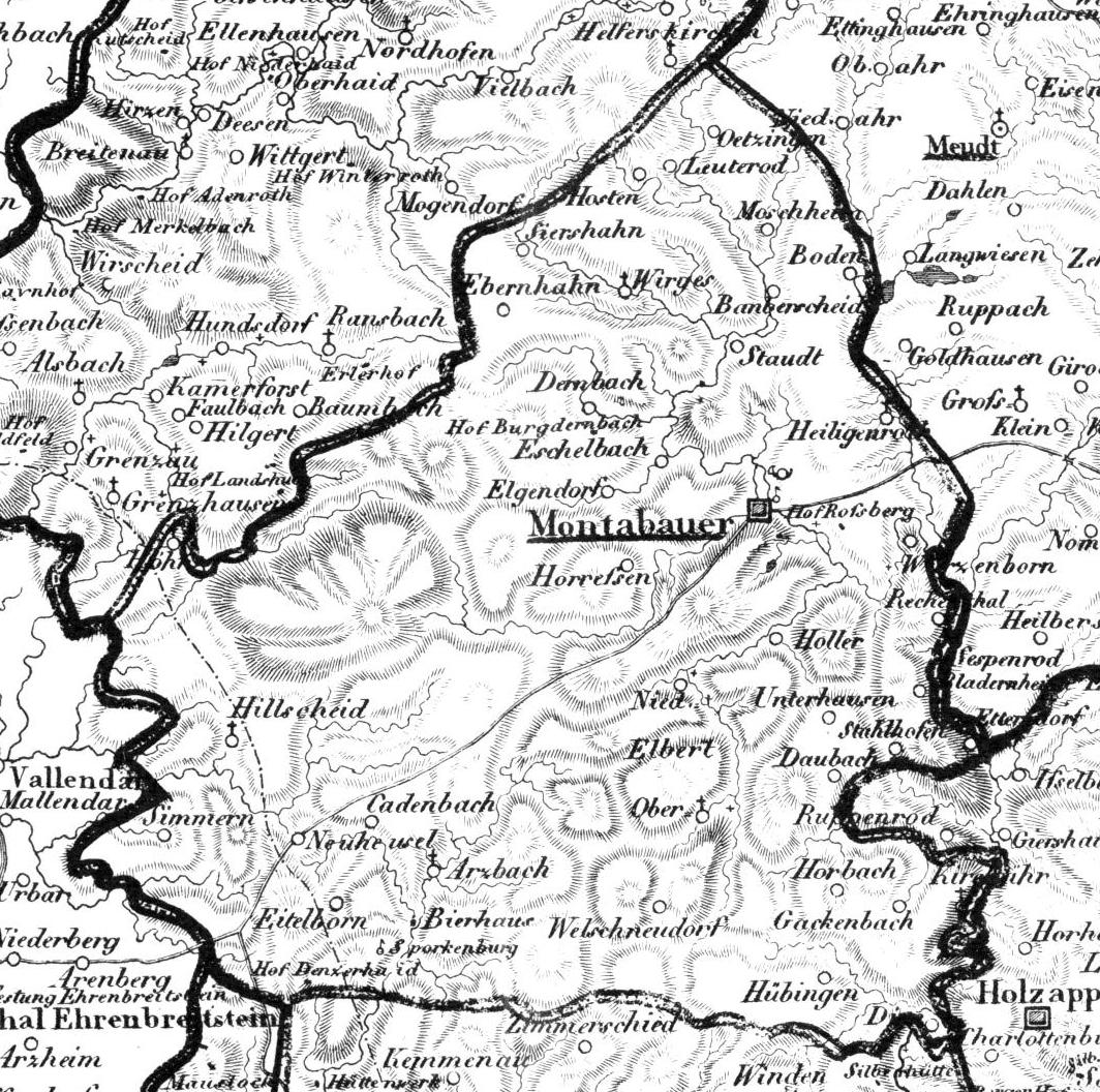 Amt Montabaur